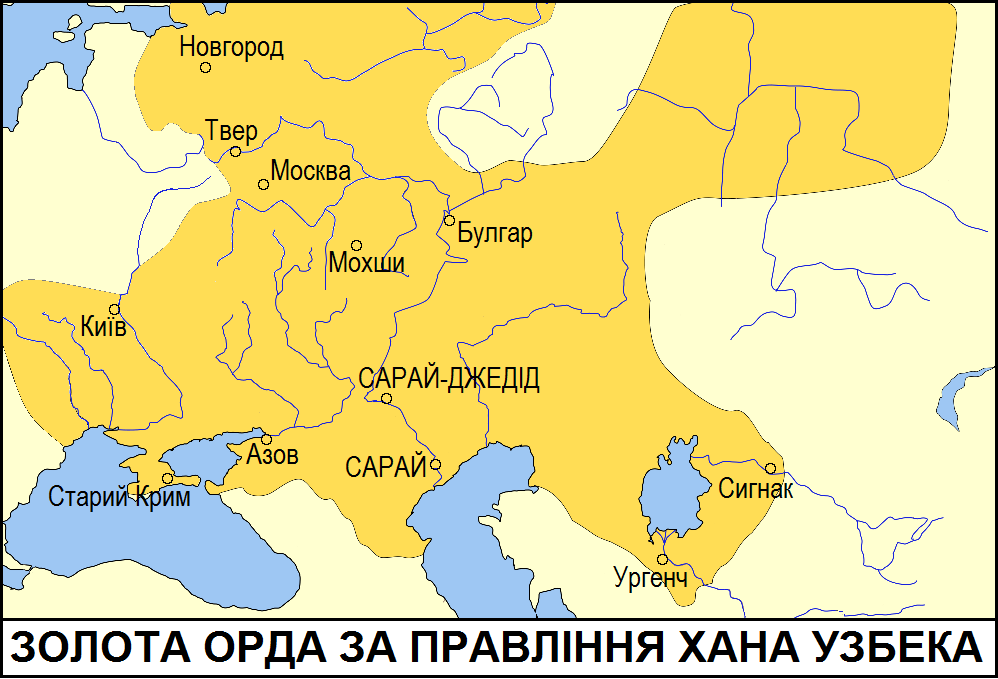 Золота Орда за правління Узбека